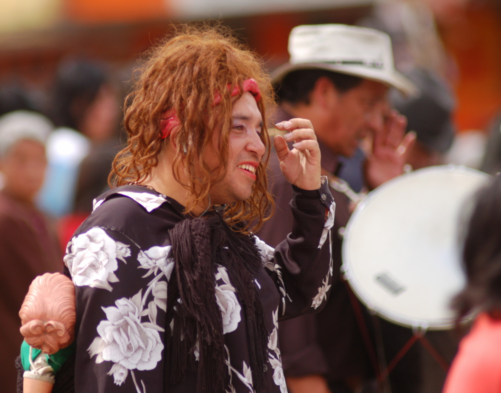 "Viuda" del desfile de Años Viejos